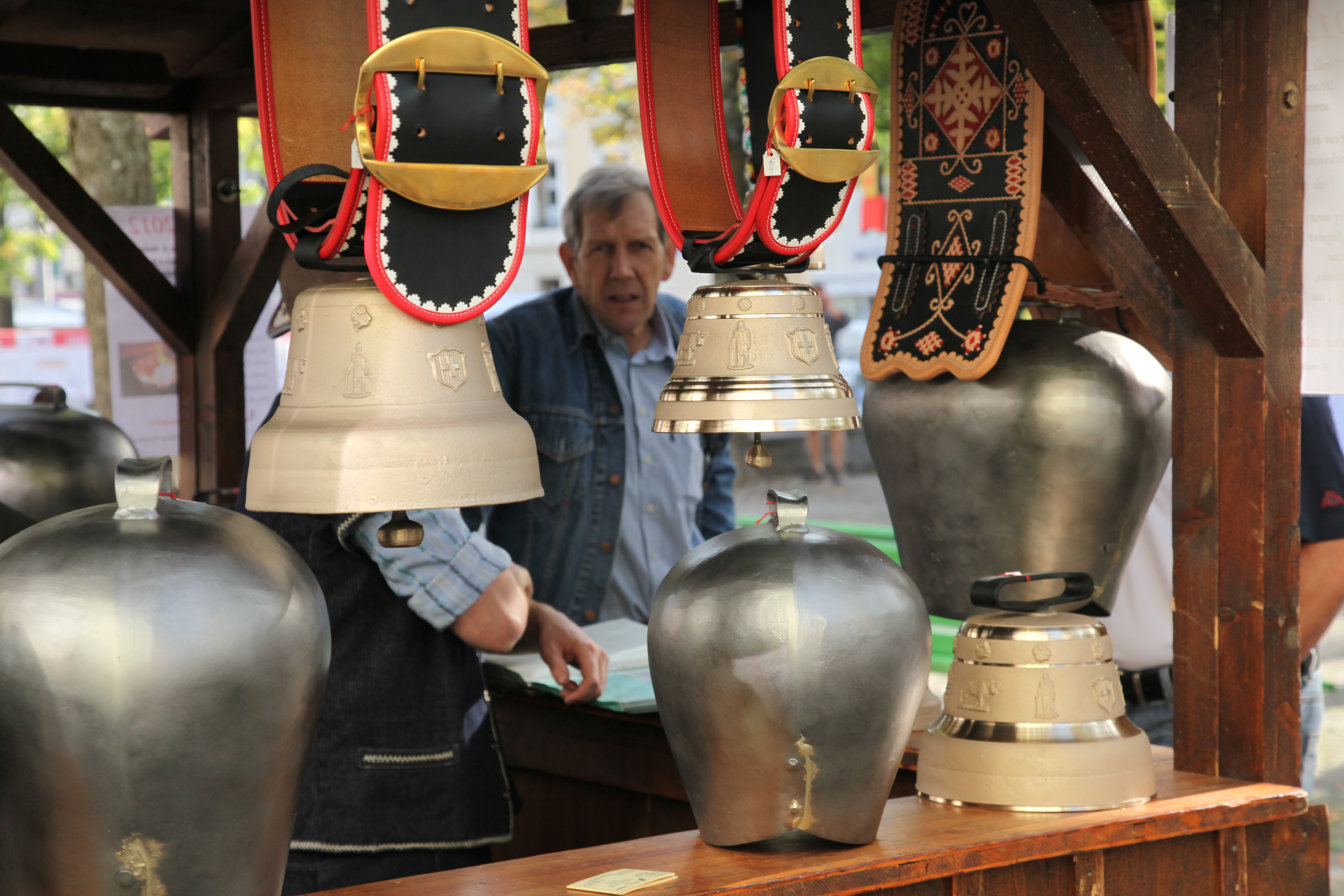 Instantanés de la Fête fédérale des sonneurs de cloches à Bulle (canton de Fribourg en Suisse). Après-midi du samedi 3 septembre 2011. Photo: Pierre Schwaller